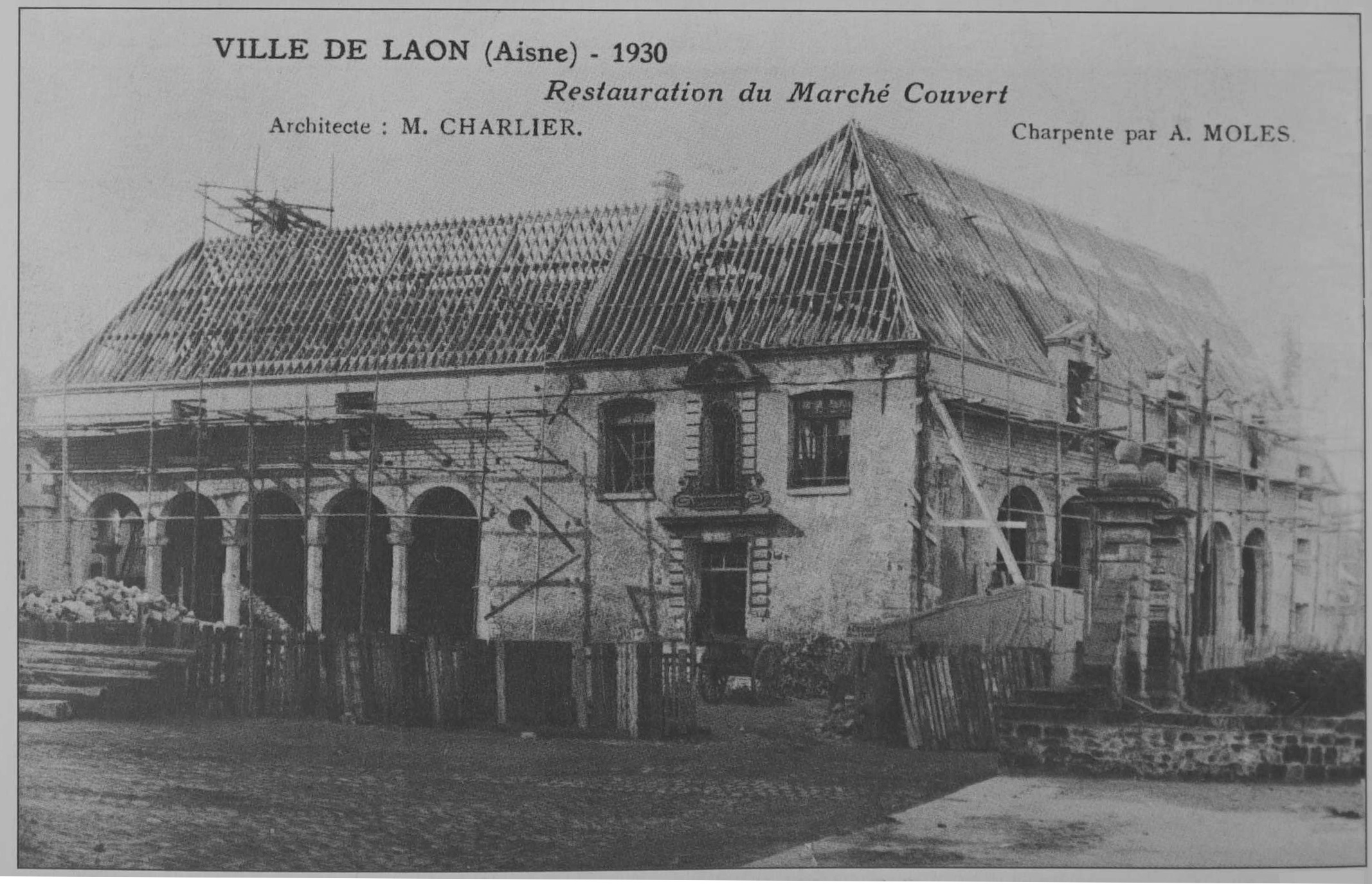 une Cartes postales de Laon.